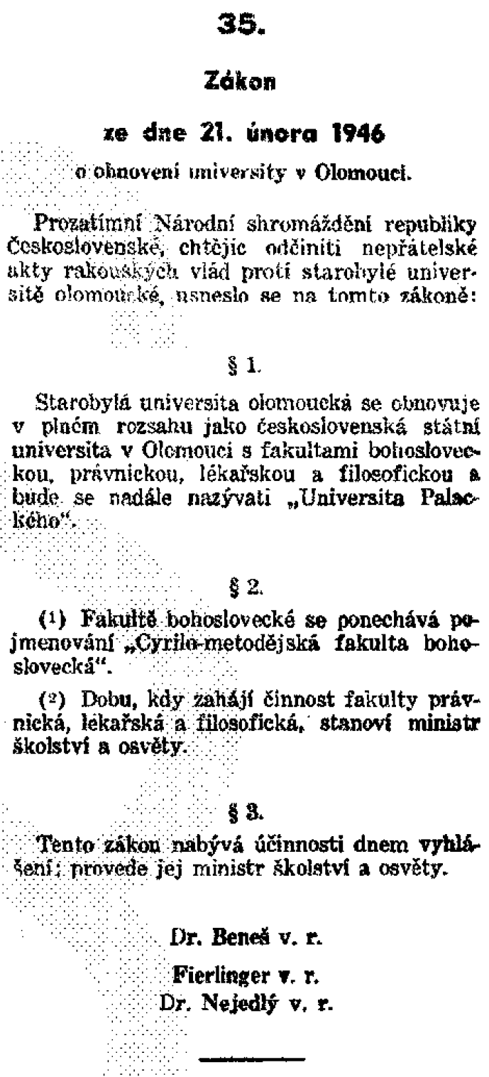 Zákon č. 35/1946 Sb., o obnovení university v Olomouci (přímá kopie textu sbírky zákonů)